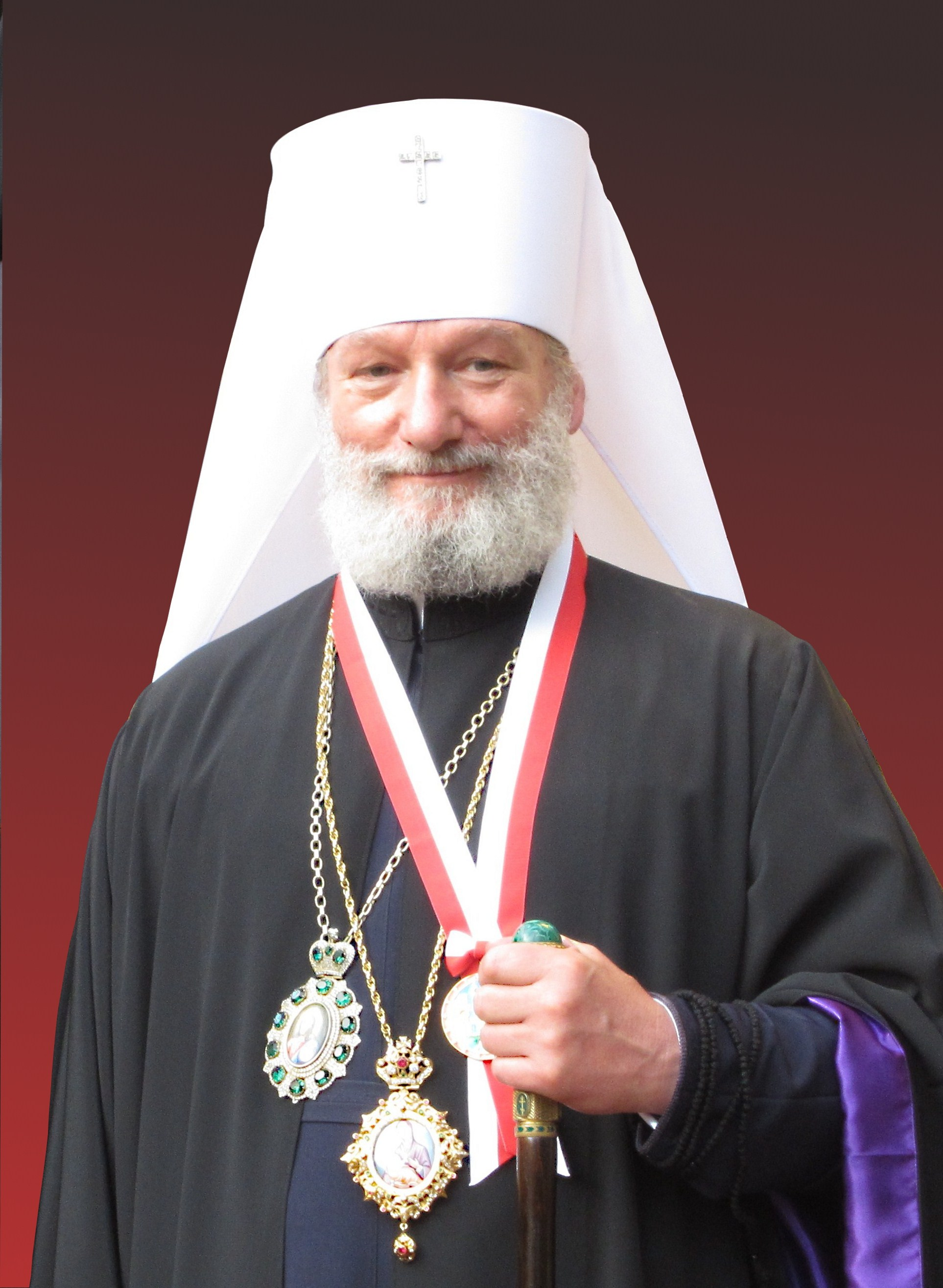 Metropolita ziem czeskich i Słowacji Krzysztof